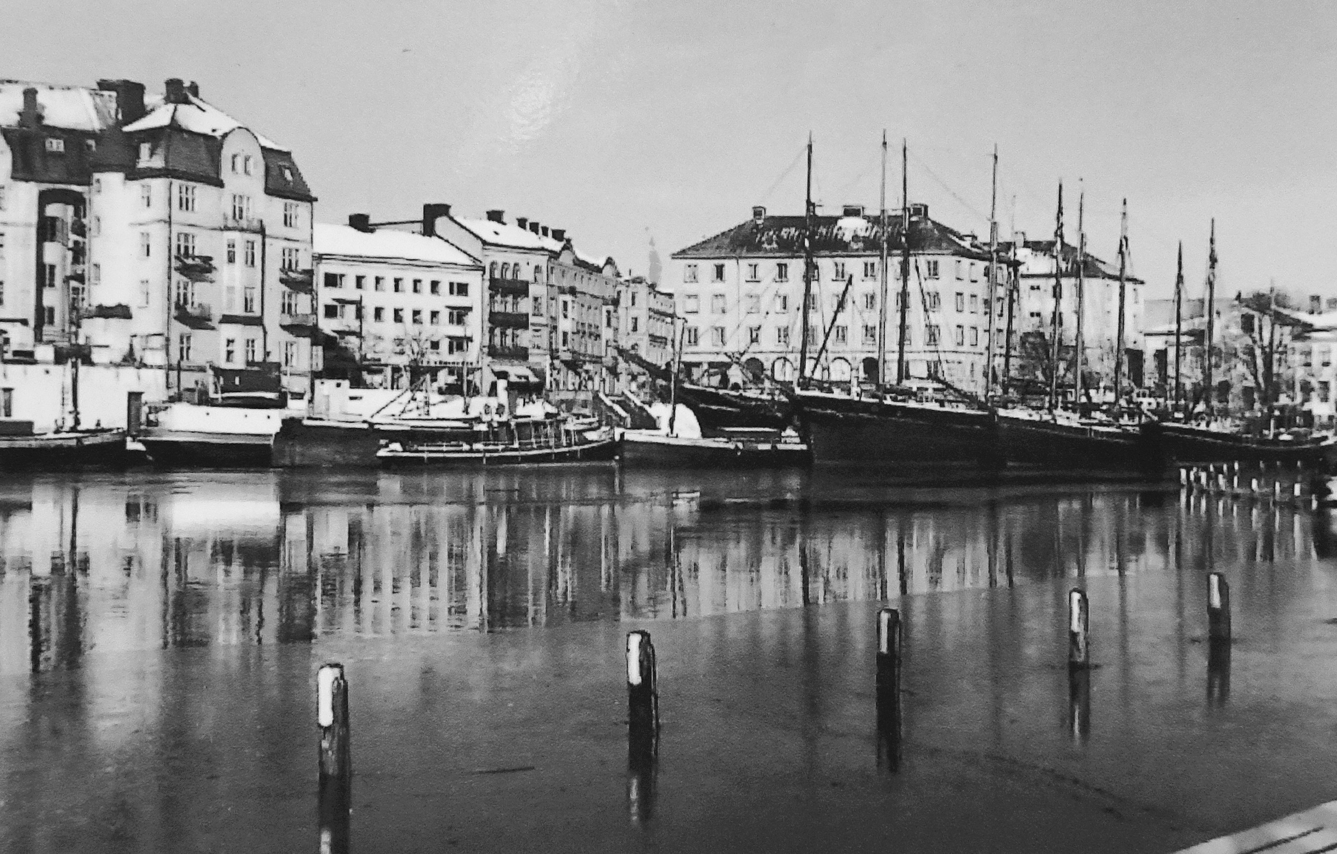 Skutor i Maren, Sädertälje